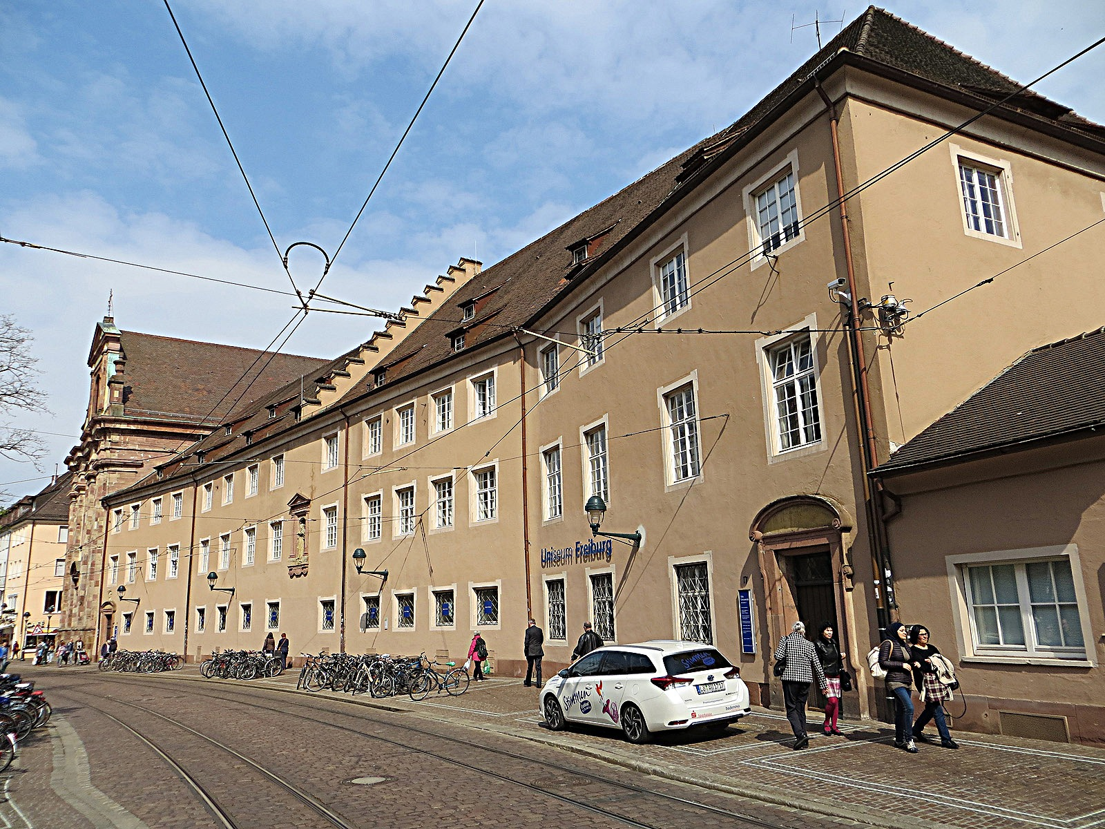 Albert-Ludwigs-Universität Freiburg